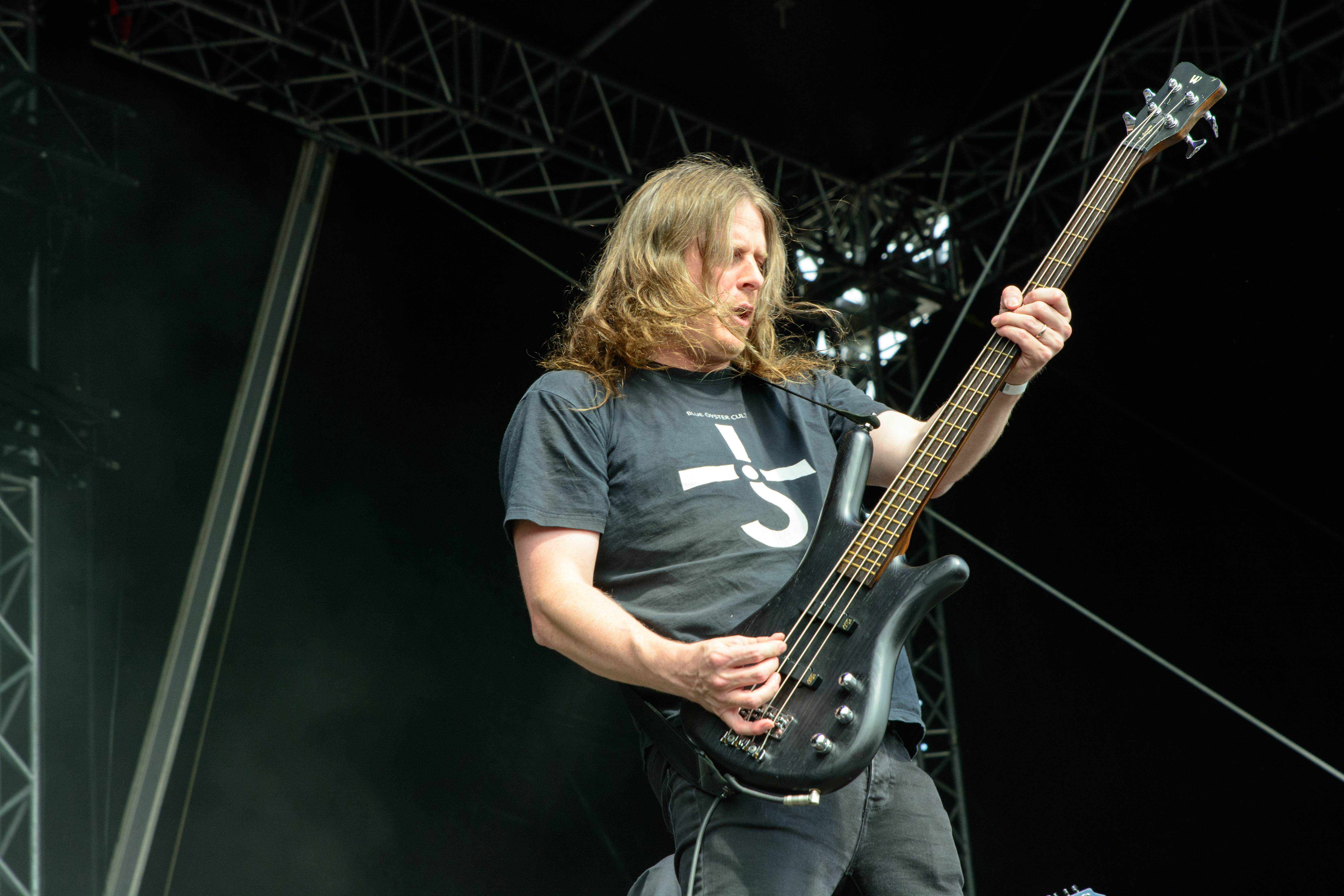 At the Gates beim Elbriot 2016